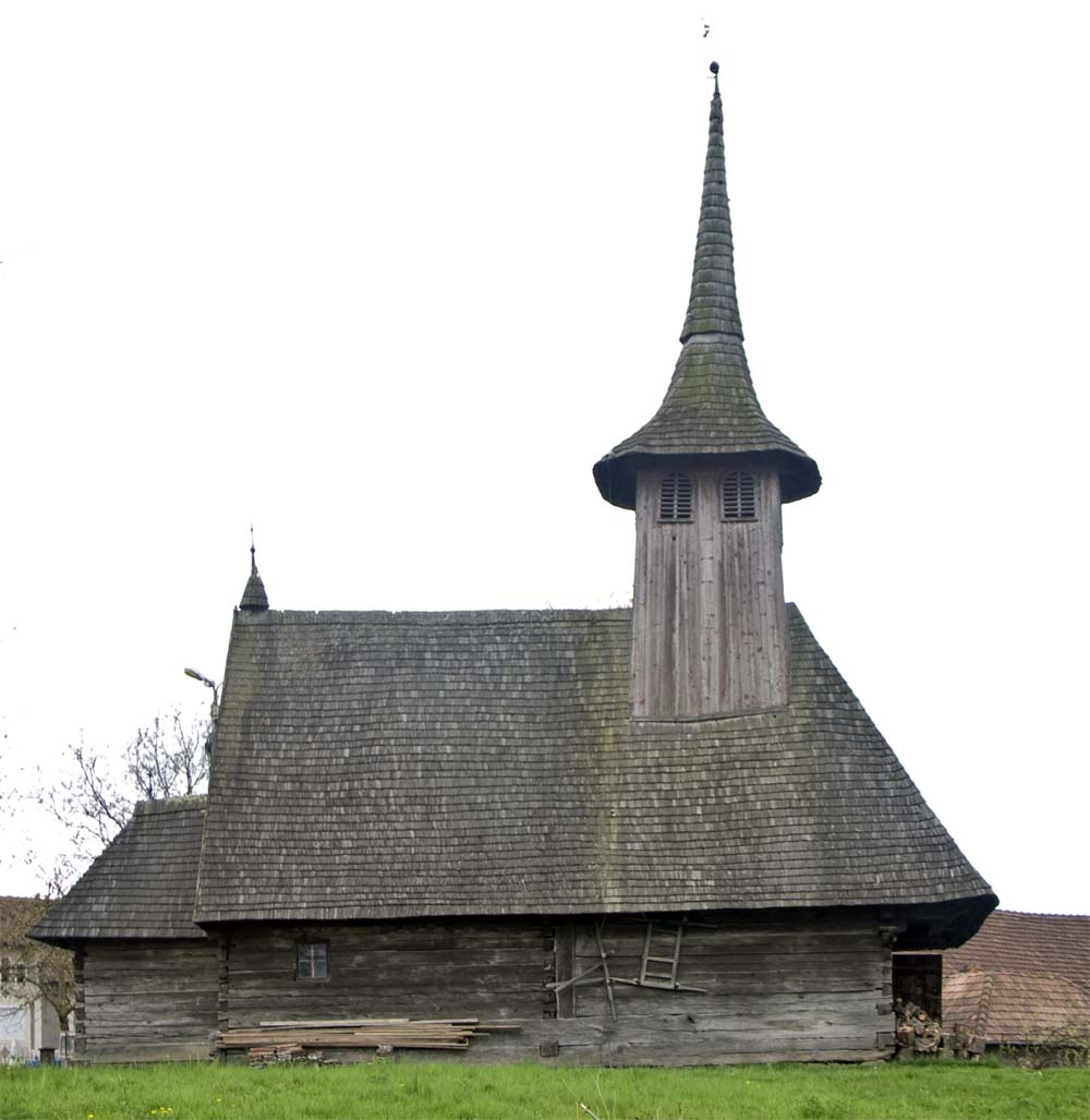 Biserica de lemn din Lazuri de Beiuş, faţa nordică.